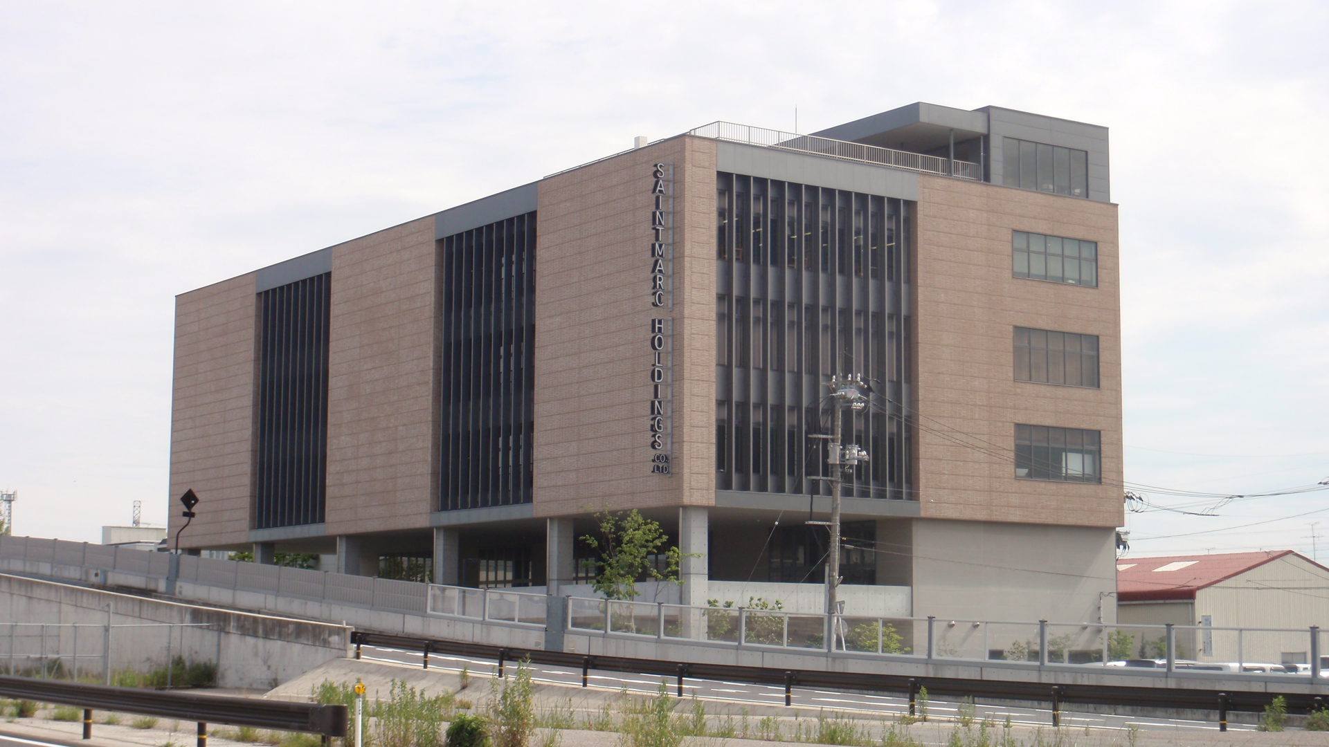 岡山県岡山市北区平田にある株式会社サンマルクホールディングス本社。